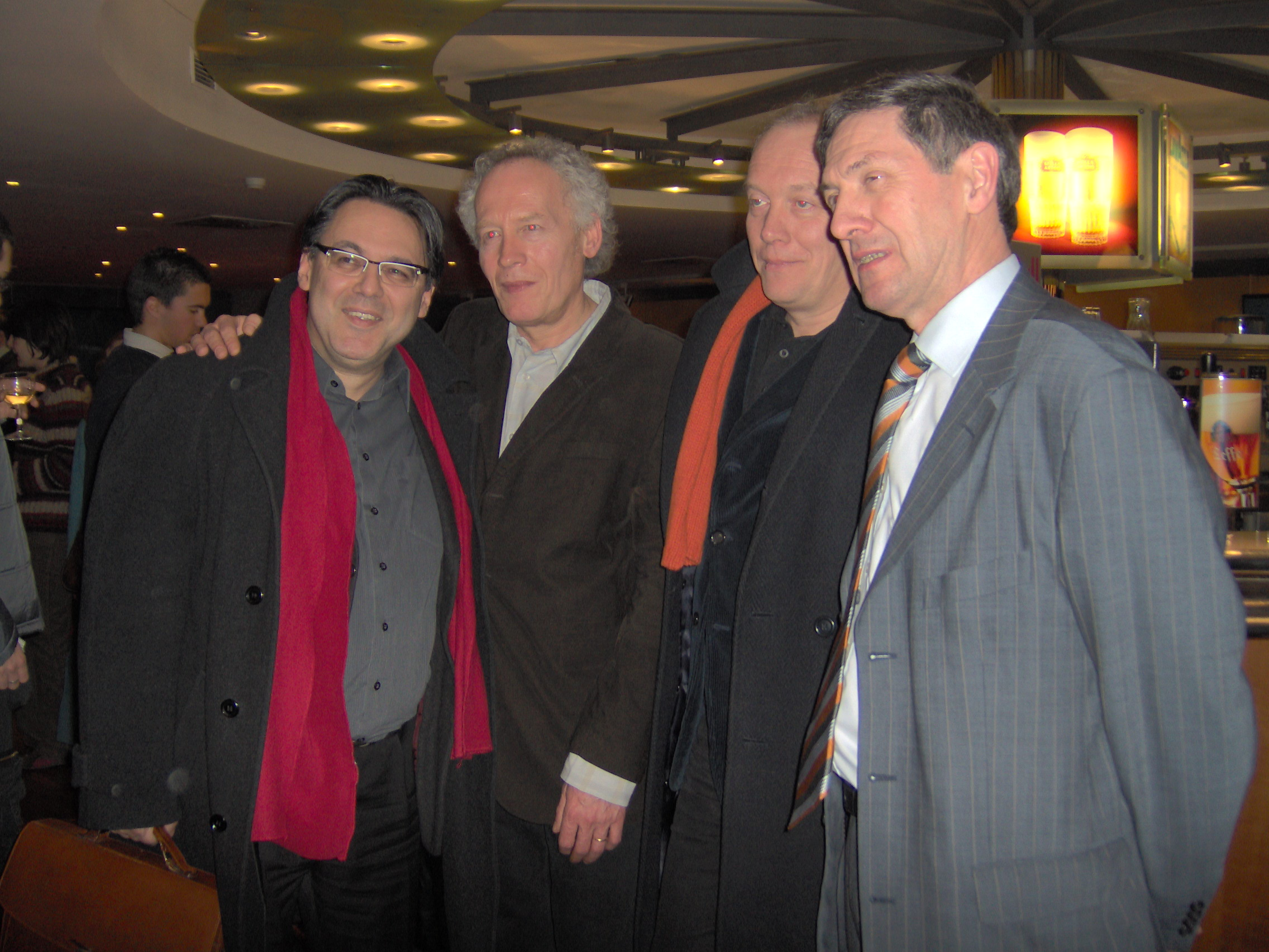 De gauche à droite: Philippe Reynaert (président de Wallimage), Jean-Pierre et Luc Dardenne (cinéastes), et Gabriel Ringlet de l'UCL, à l'UGC de Louvain-la-Neuve en 2006. Photographie personnelle